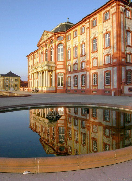 Schloss Bruchsal mit Spiegelbild